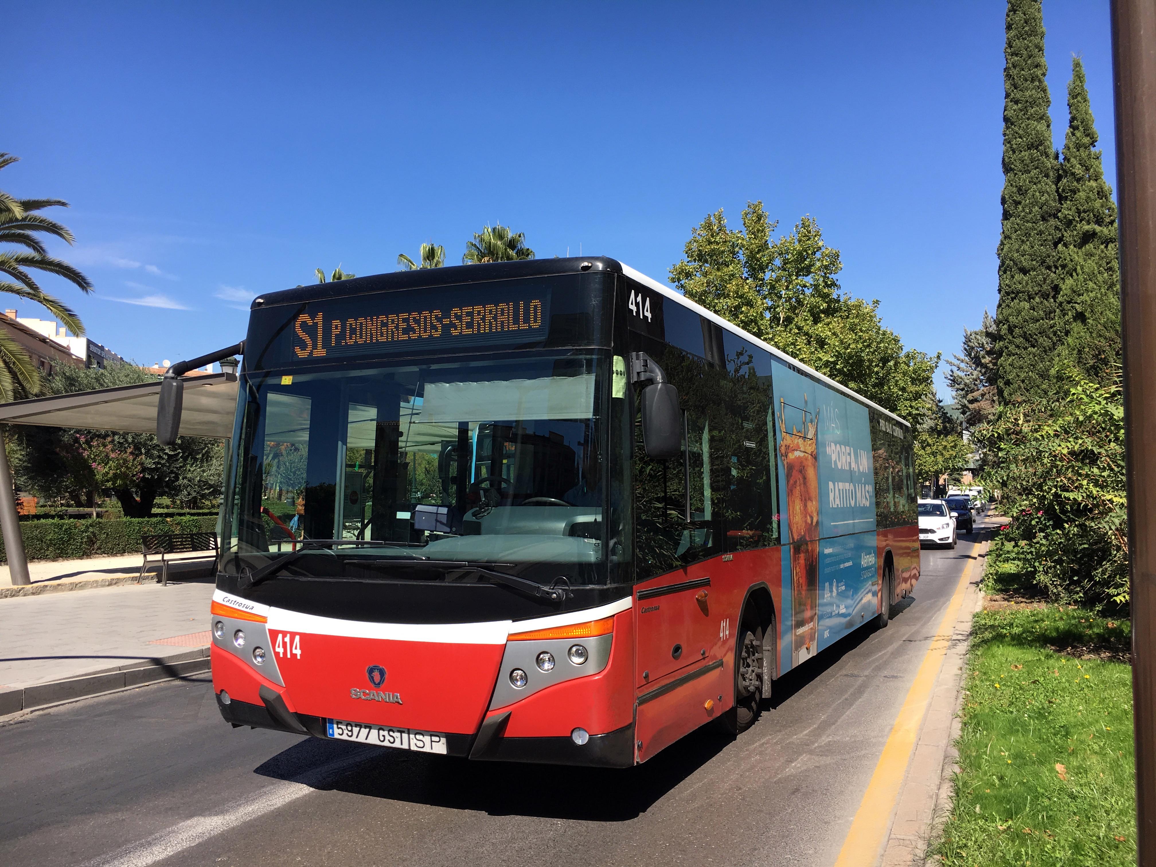 Bus S1 de la red de autobuses urbanos de Granada cerca del Palacio de Congresos.